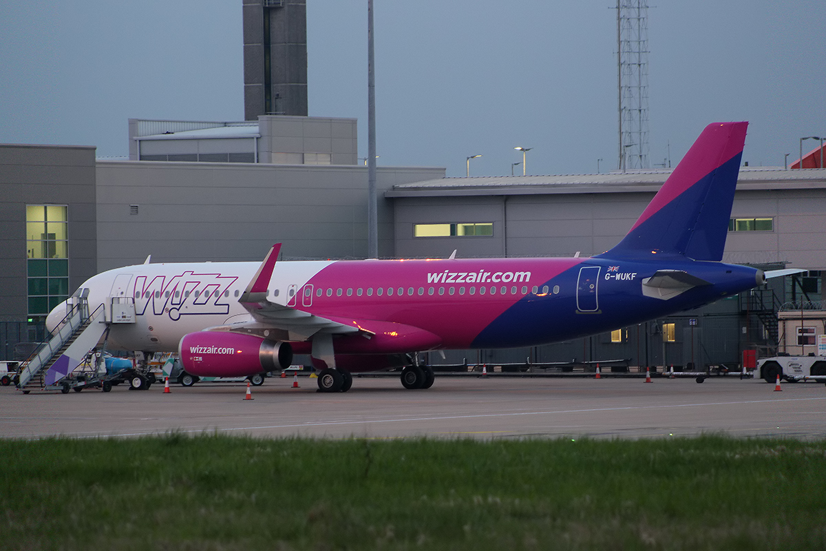 G-WUKF Airbus A320-232 @ Luton 14/04/2018